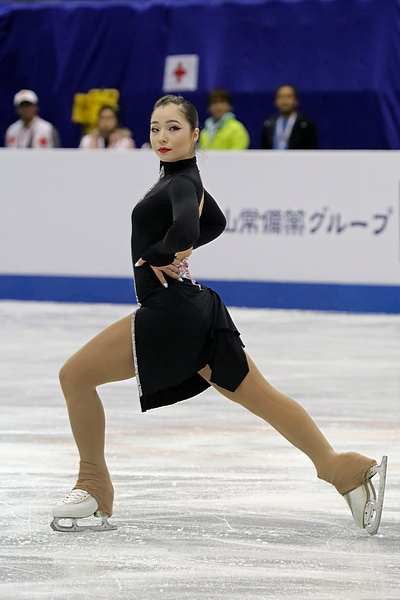 Айза Мамбекова (Казахстан) на чемпионате мира среди юниоров 2017